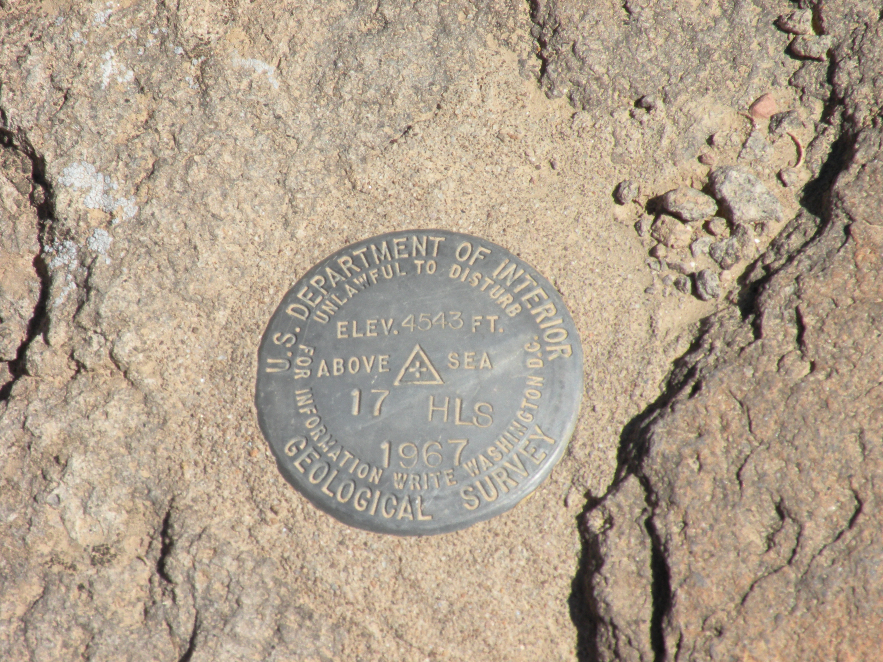 Plaque géographique de la zone 51